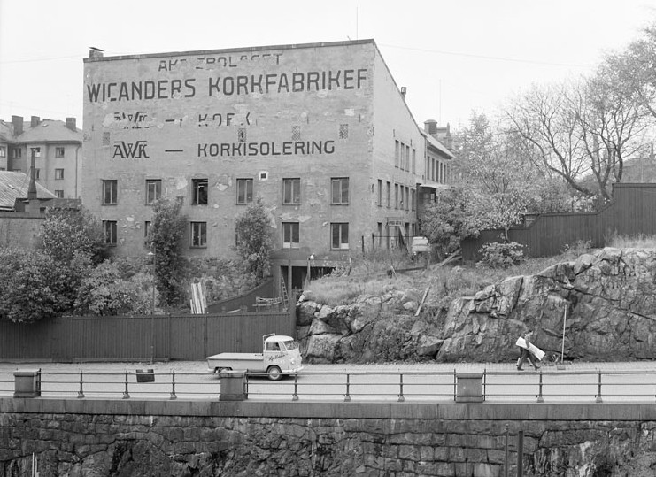 Torkel Knutssonsgatan från öster. Gaveln till Wicanders Korkfabrik vid Brännkyrkagatan 68. Nuv. kv. Leporiden